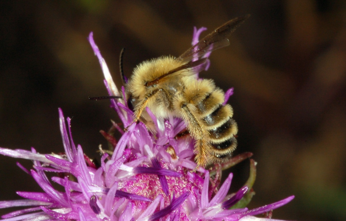 Dasypoda hirtipes, Männchen, Eberstädter Düne, Darmstadt, Hessen, Deutschland